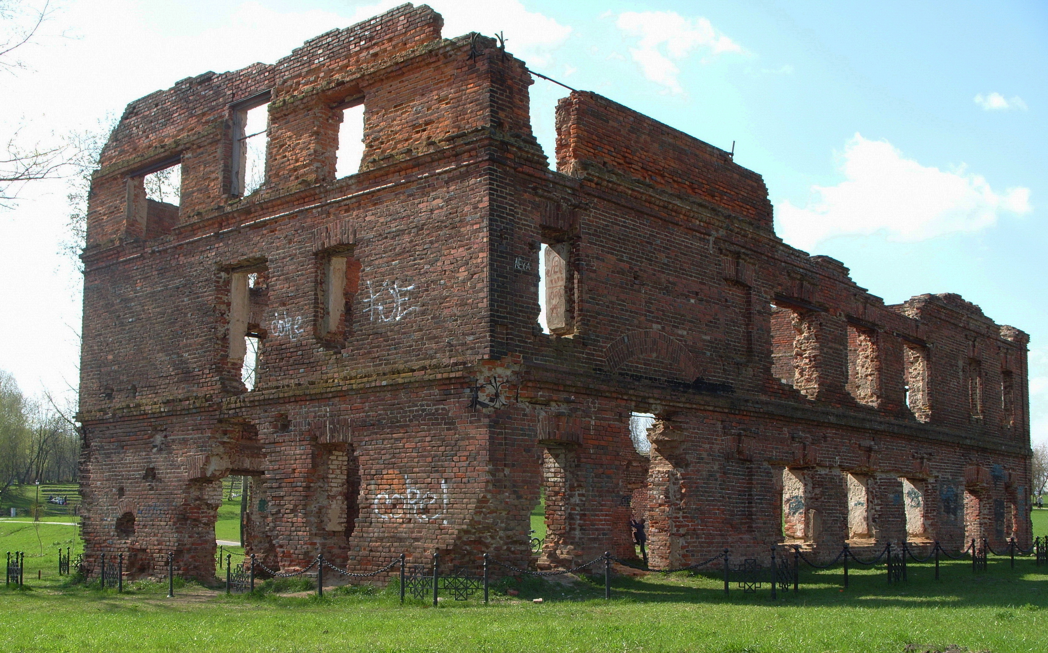 Беларуская (тарашкевіца): Рэшткі млына ў Лошыцы (Менск) This is a photo of Belarusian heritage monument. Reference number: 712Г000266 ( WLM)